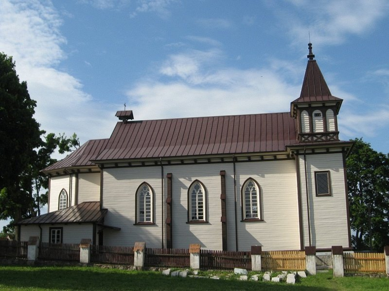 Паланечка. Драўляны касцёл